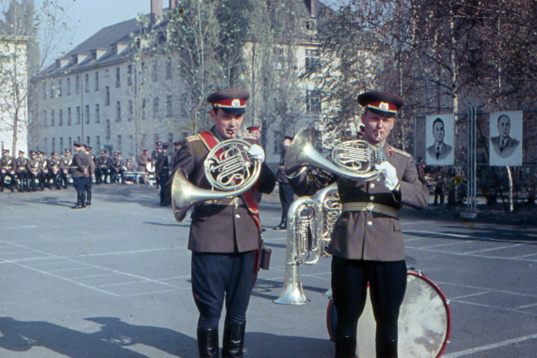 Не музыканты В. Башаров и А. Дорофеев на плацу 67-го гв. мсп. Гримма 1970.